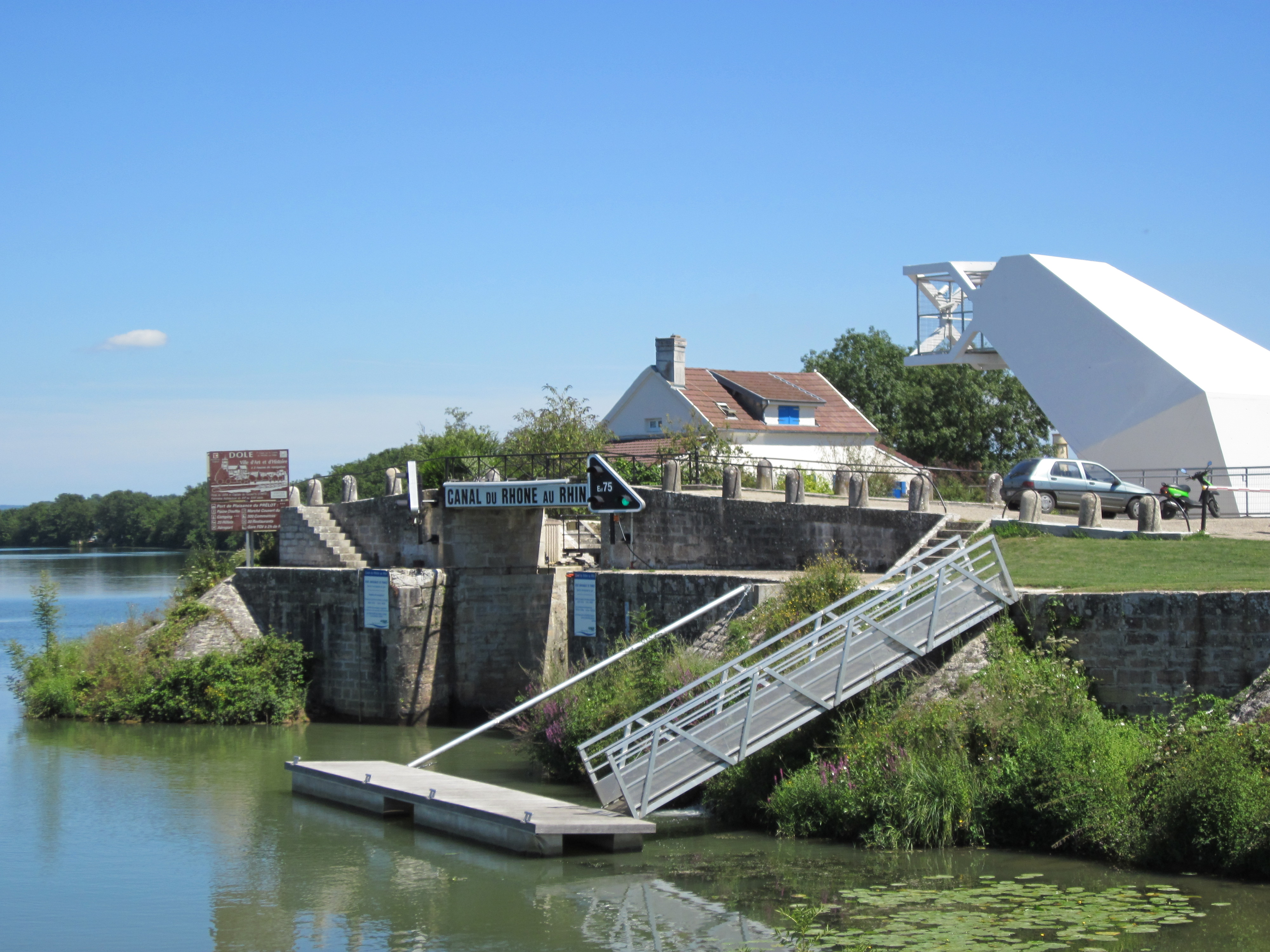 Canal du Rhône au Rhin - Saint-Symphorien-sur-Saône : embouchure sur la Saône en Côte d'Or Note : on aperçoit la cabine d'écluse de 6 m de haut réalisée par Didier Fiuza Faustino